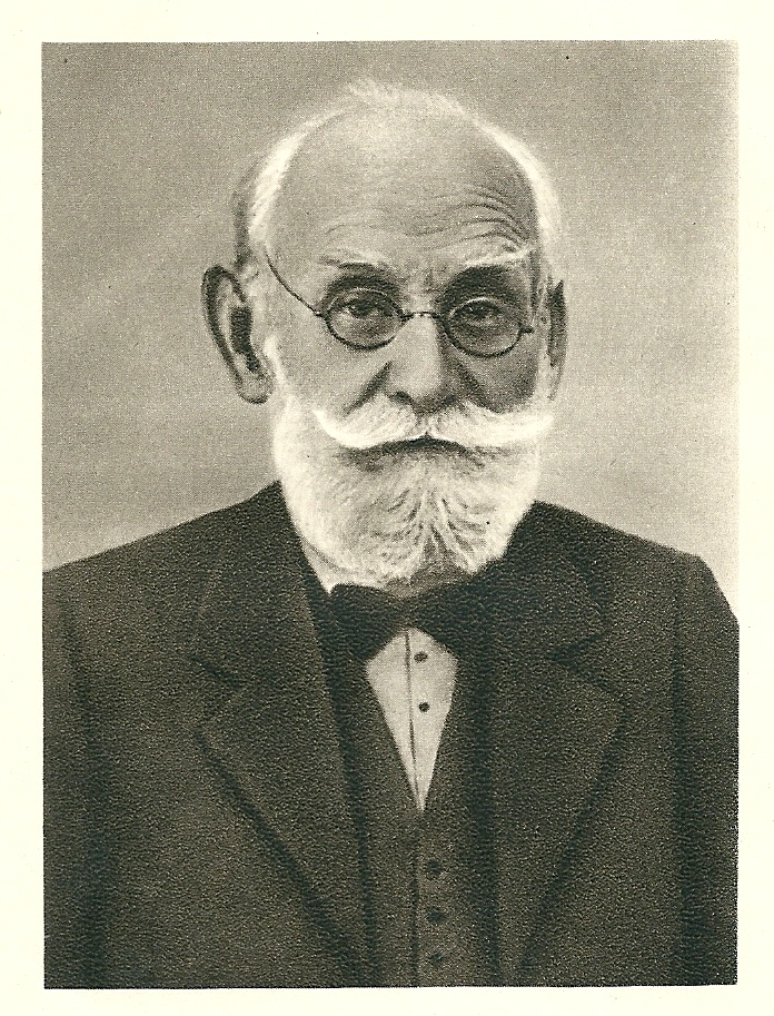 Ivan Pavlov, vers la fin de sa vie (en 1935)